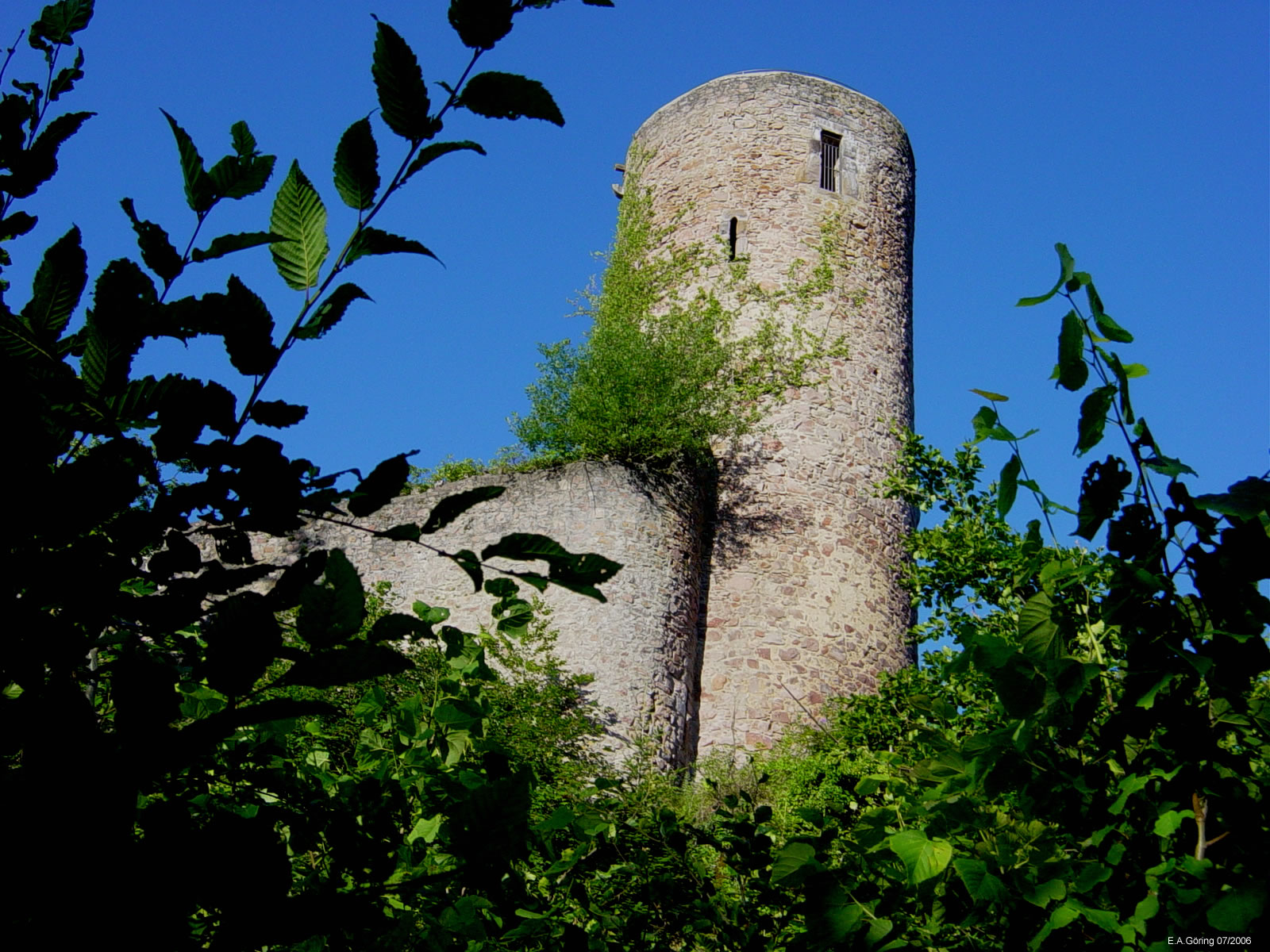 Burgruine Sausenburg im Markgräflerland, Südschwarzwald.